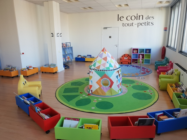 Vue de l'intérieur de la médiathèque du Perreux-sur-Marne (France)